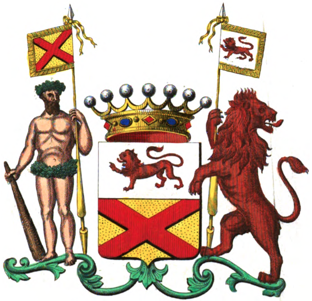 Armoiries de la famille de Bonhome